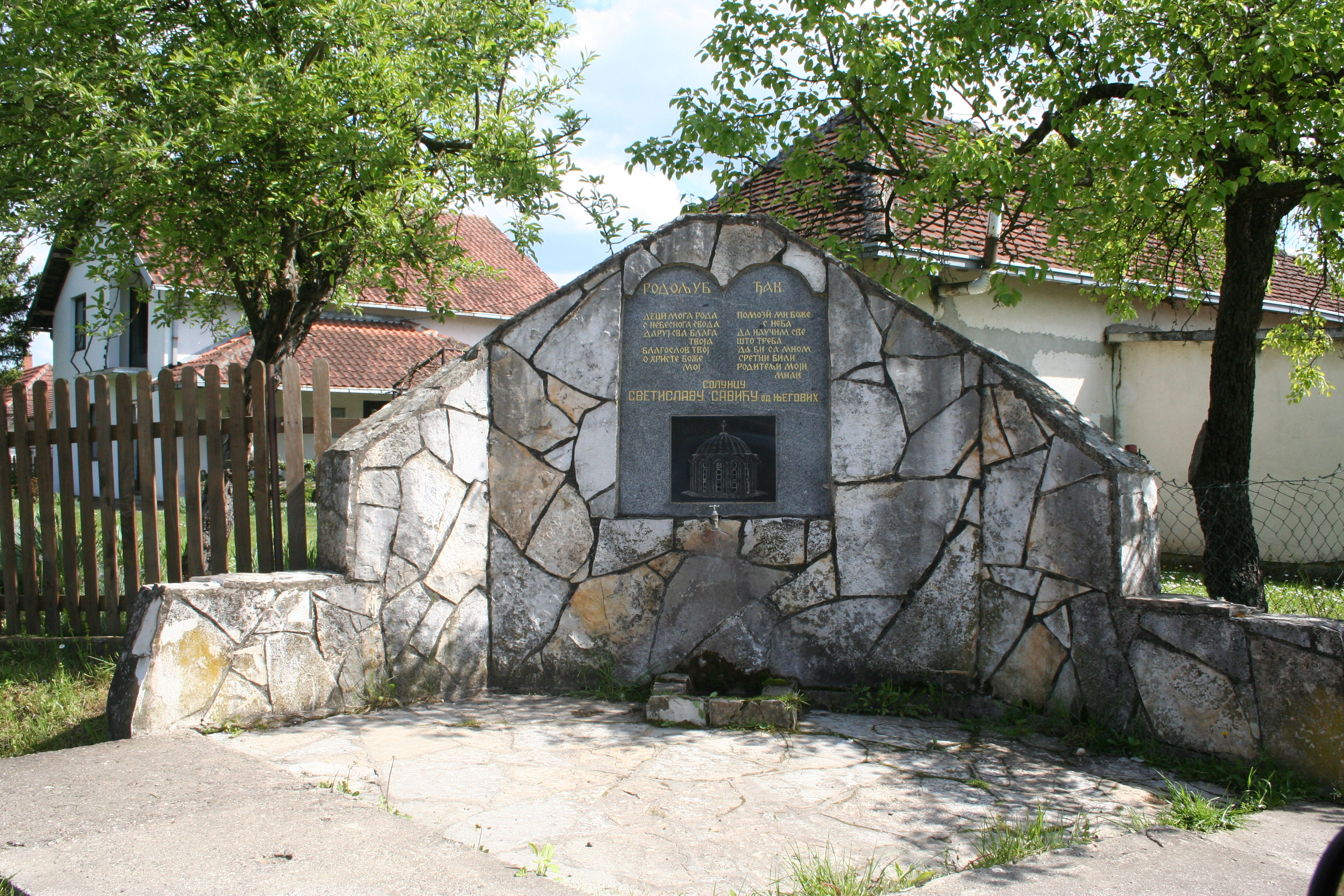 Spomen česma u Rabrovici, Divci